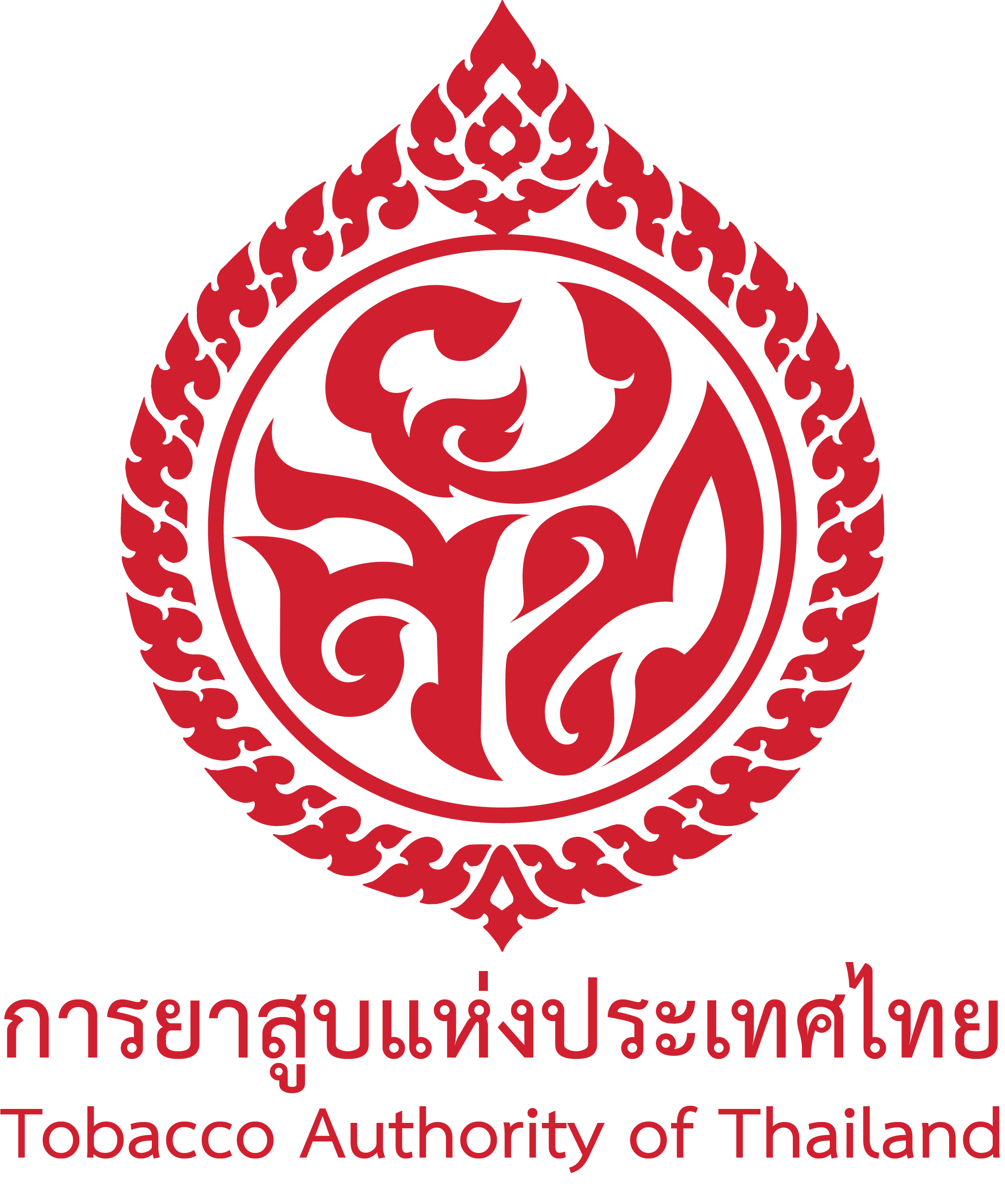 ตราสัญลักษณ์การยาสูบแห่งประเทศไทย